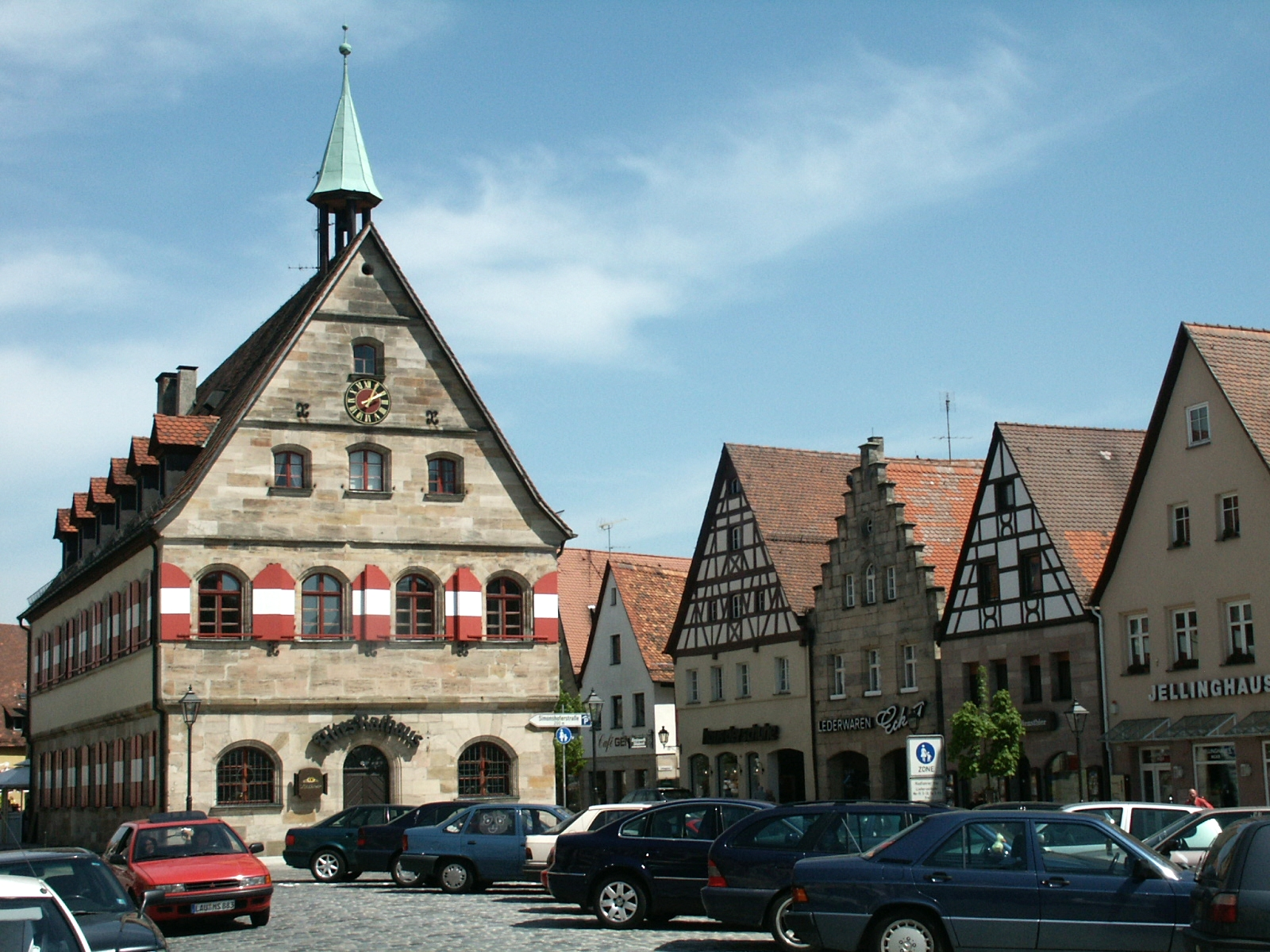 Altes Rathaus und Marktplatz in Lauf an der Pegnitz